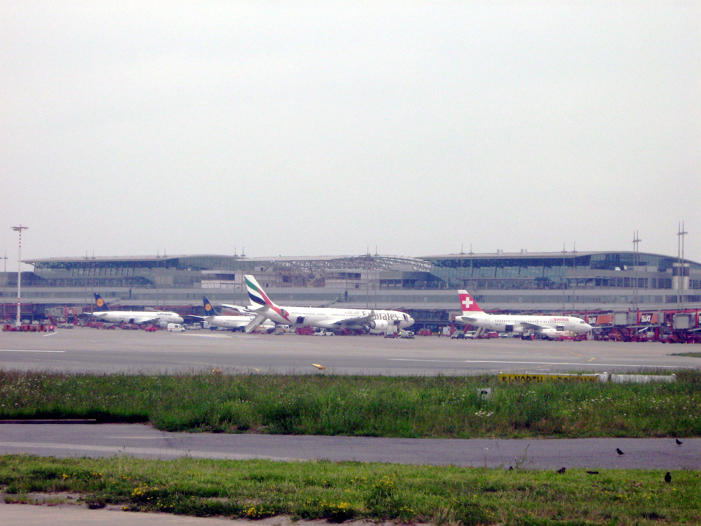 Beide Terminals des Flughafens von Hamburg